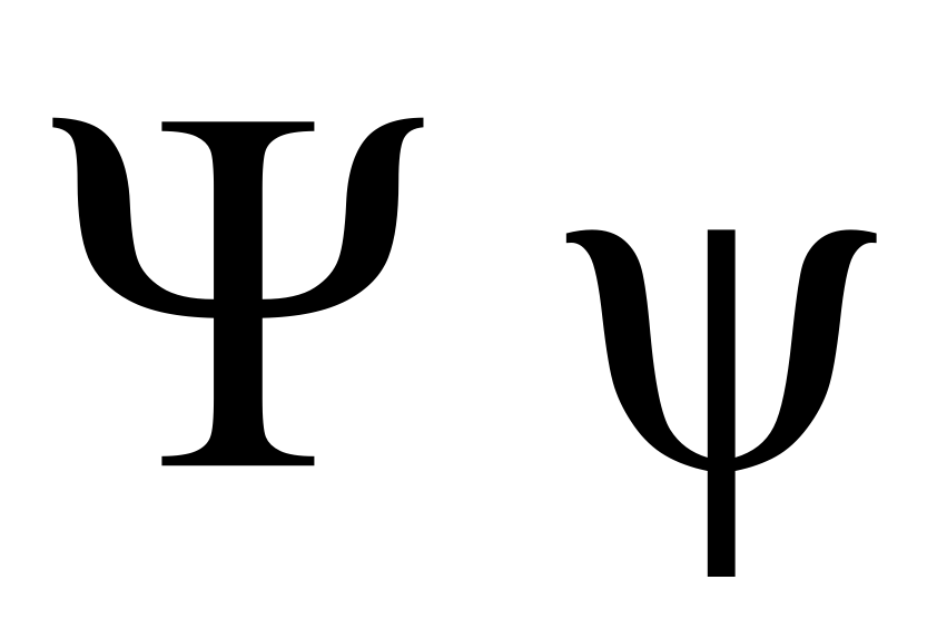 greek letter psi